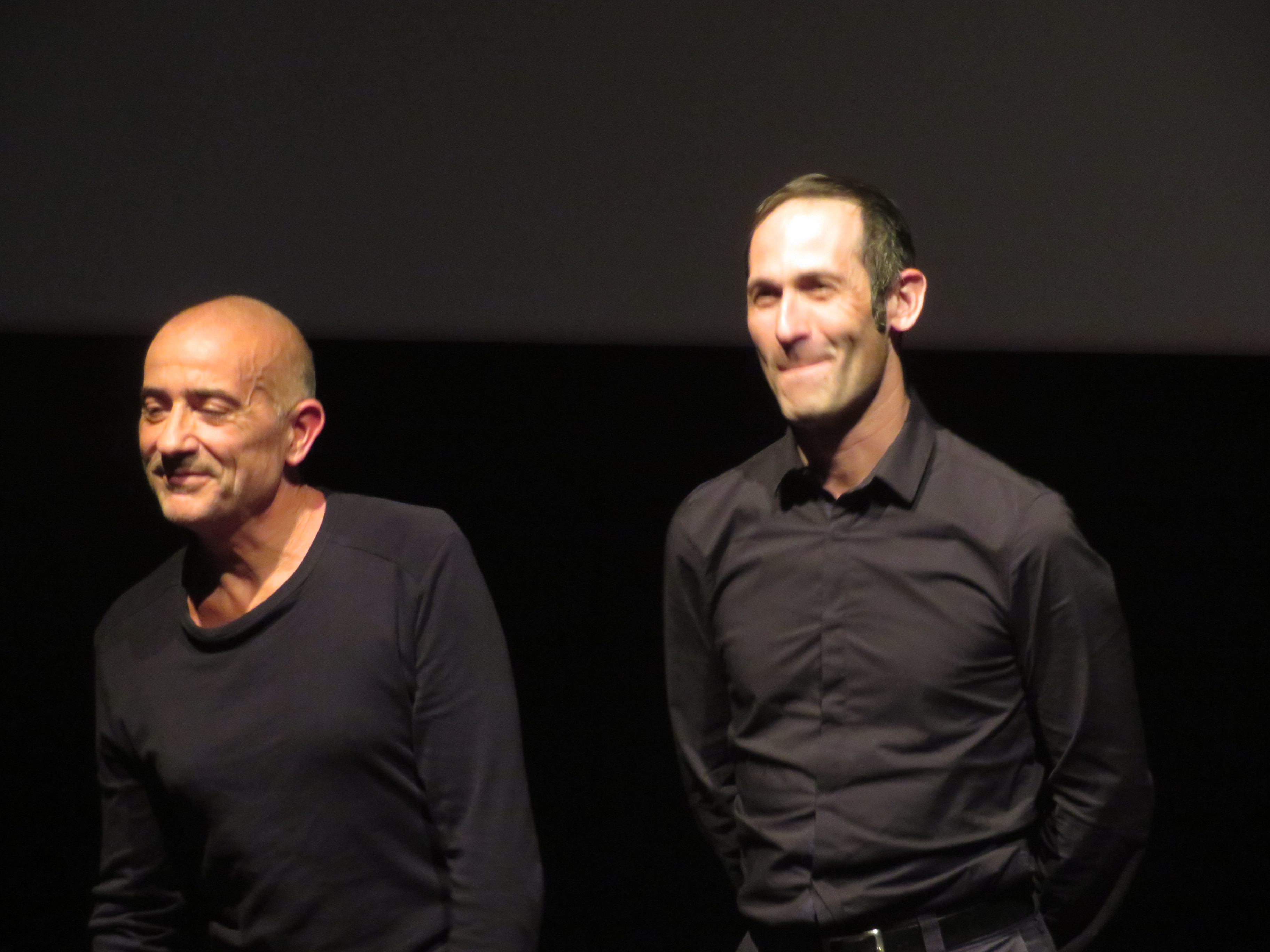 Le duo Zone Libre (composé de Serge Teyssot-Gay et de Cyril Bilbeaud) après l'interprétation du ciné-concert "Dr. Jekyll et Mr. Hyde", le samedi 03 novembre 2018 à Beauvais (Oise).